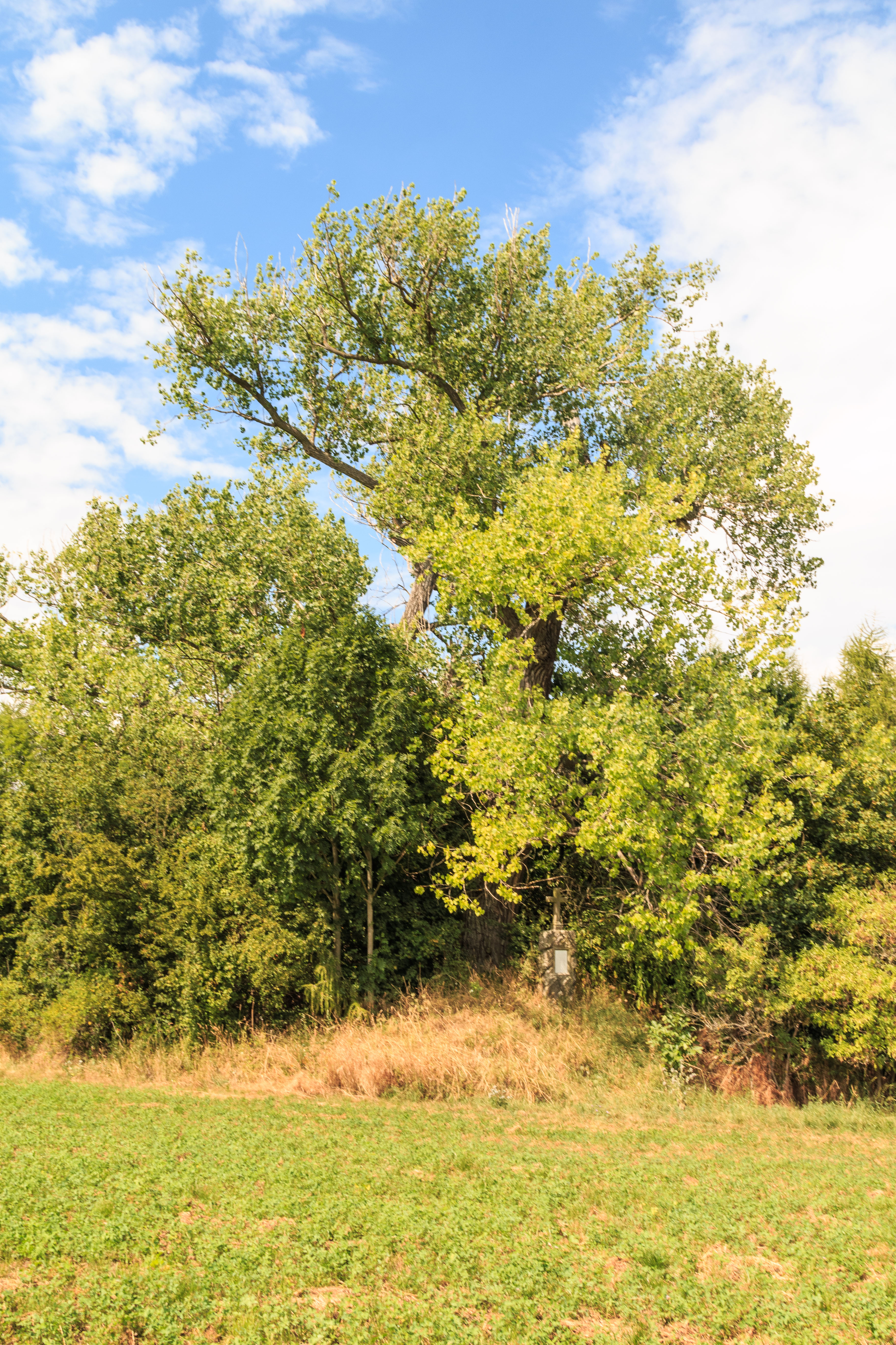 Polní opevnění, poblíž kostela sv. Jiří, Orel (okres Chrudim).